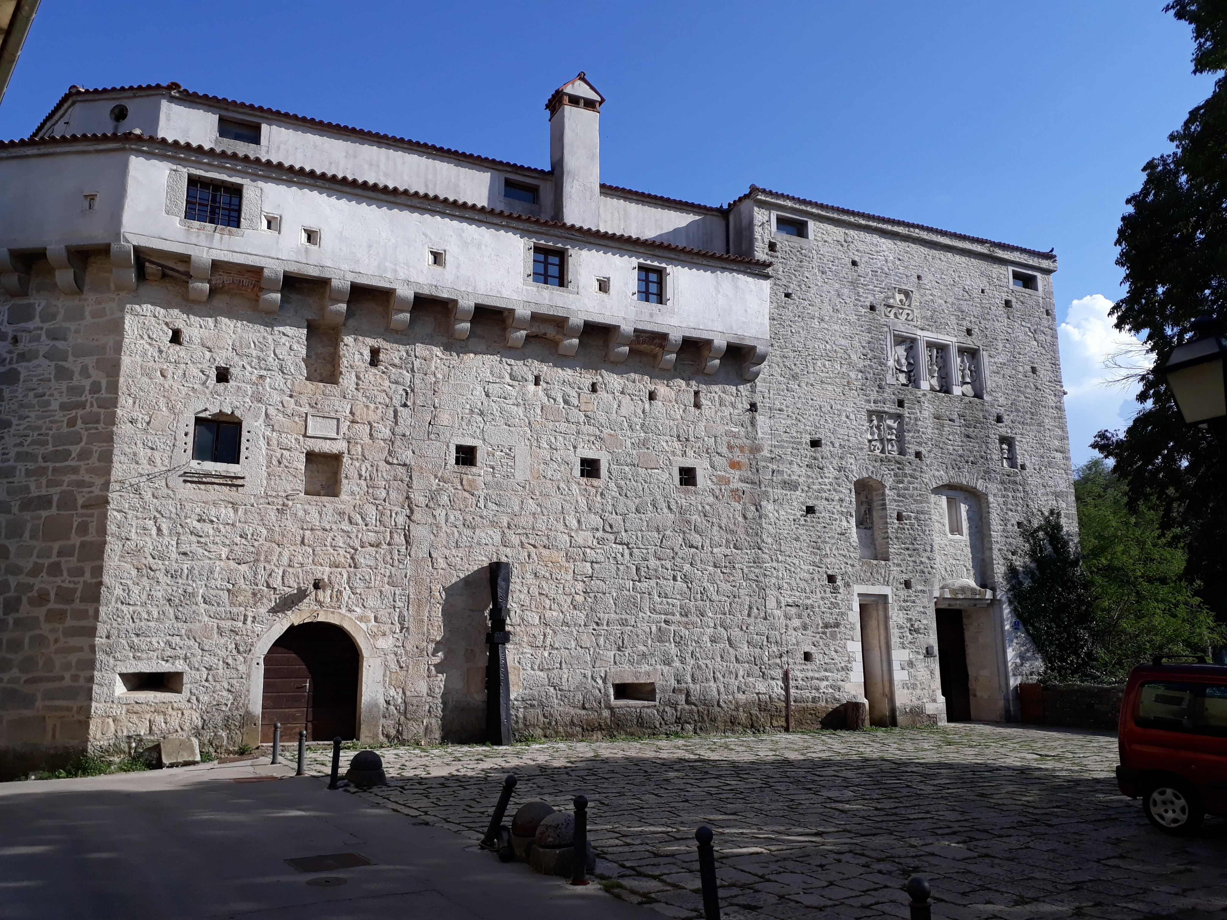 Srednjovjekovna utvrda građena od 10. do 16. st.